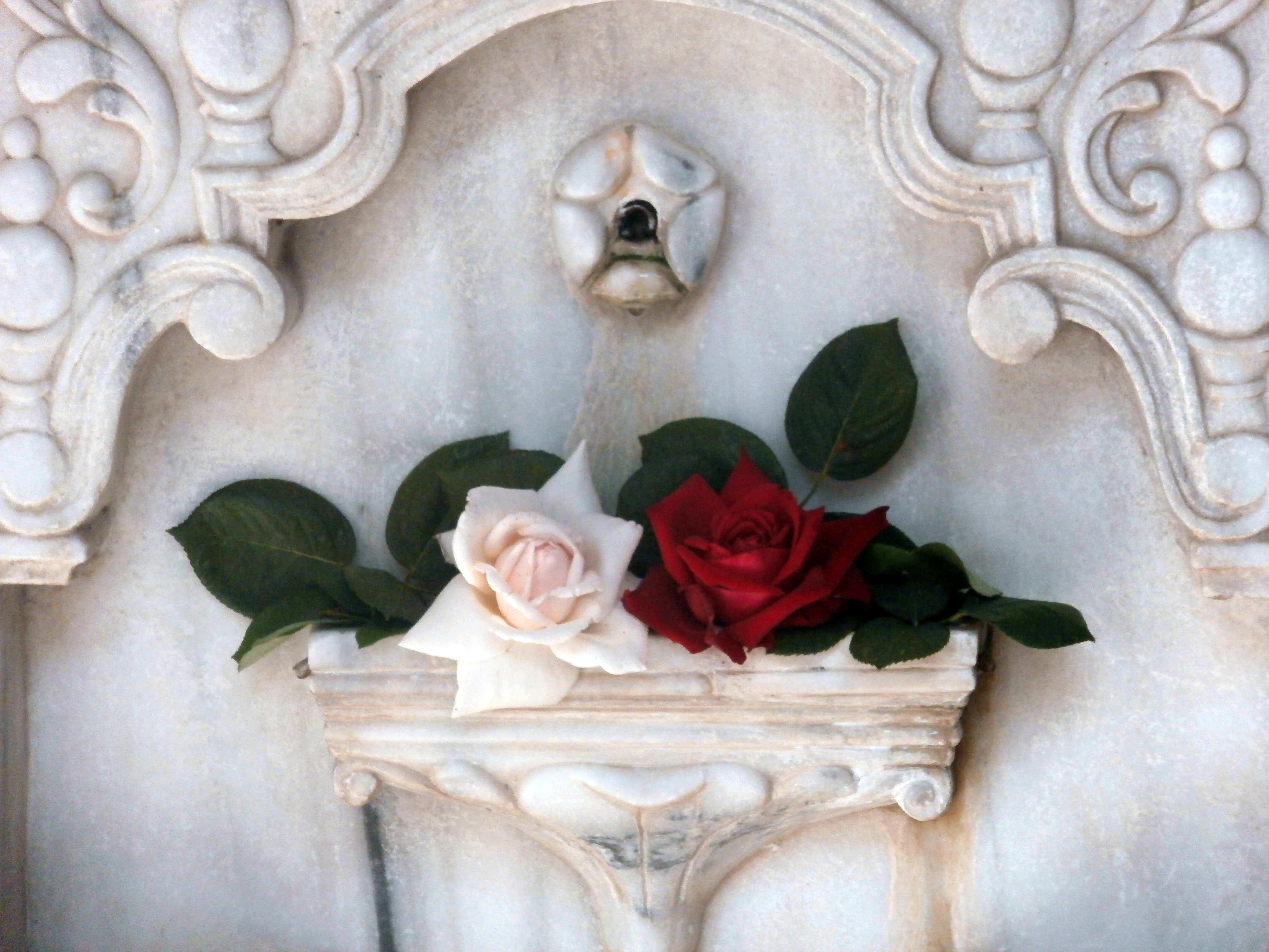 Розы, возложенные на Бахчисарайский фонтан слёз